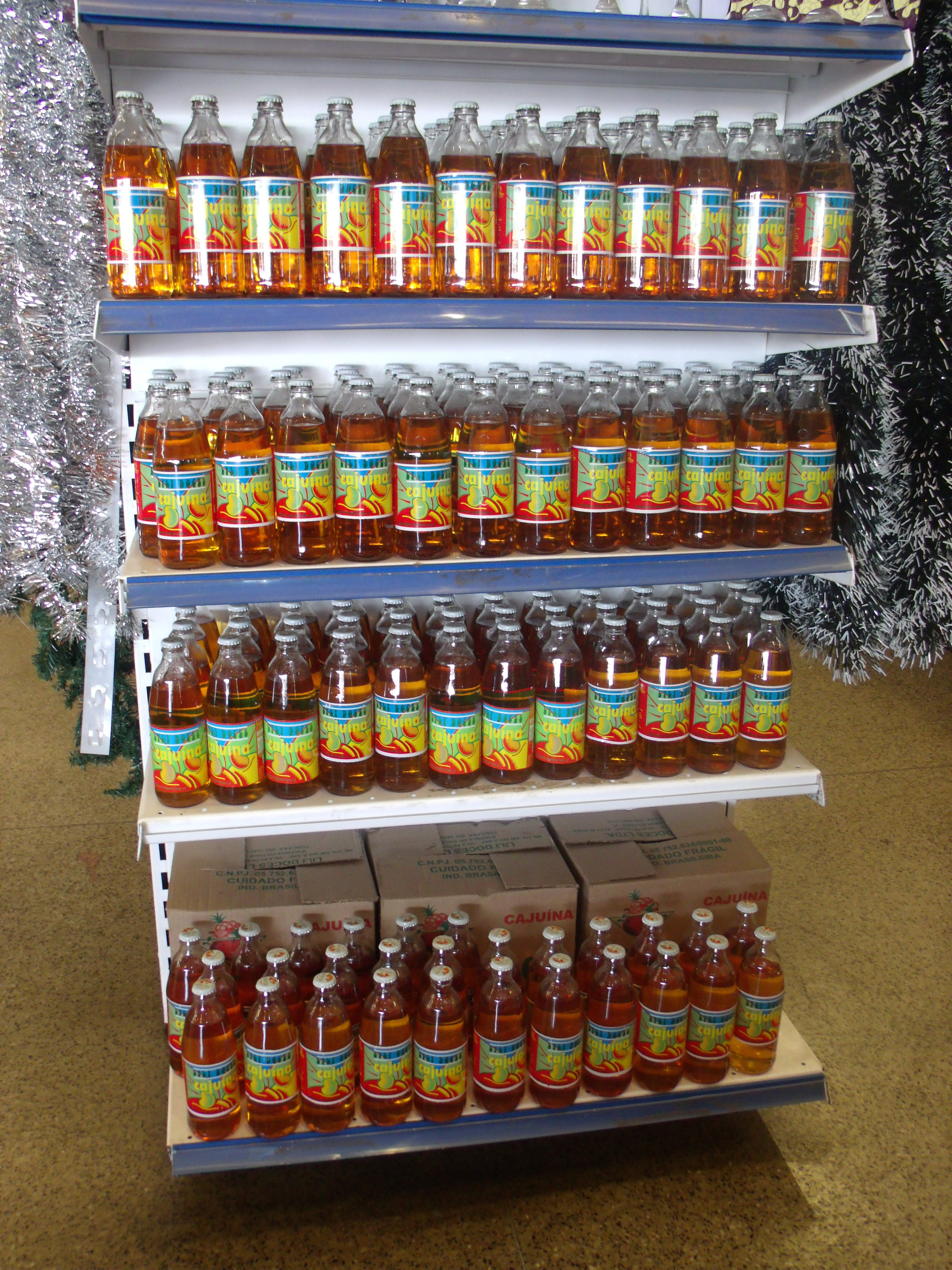 Cajuína no Comercial Carvalho, feita em Ipiranga do Piauí.